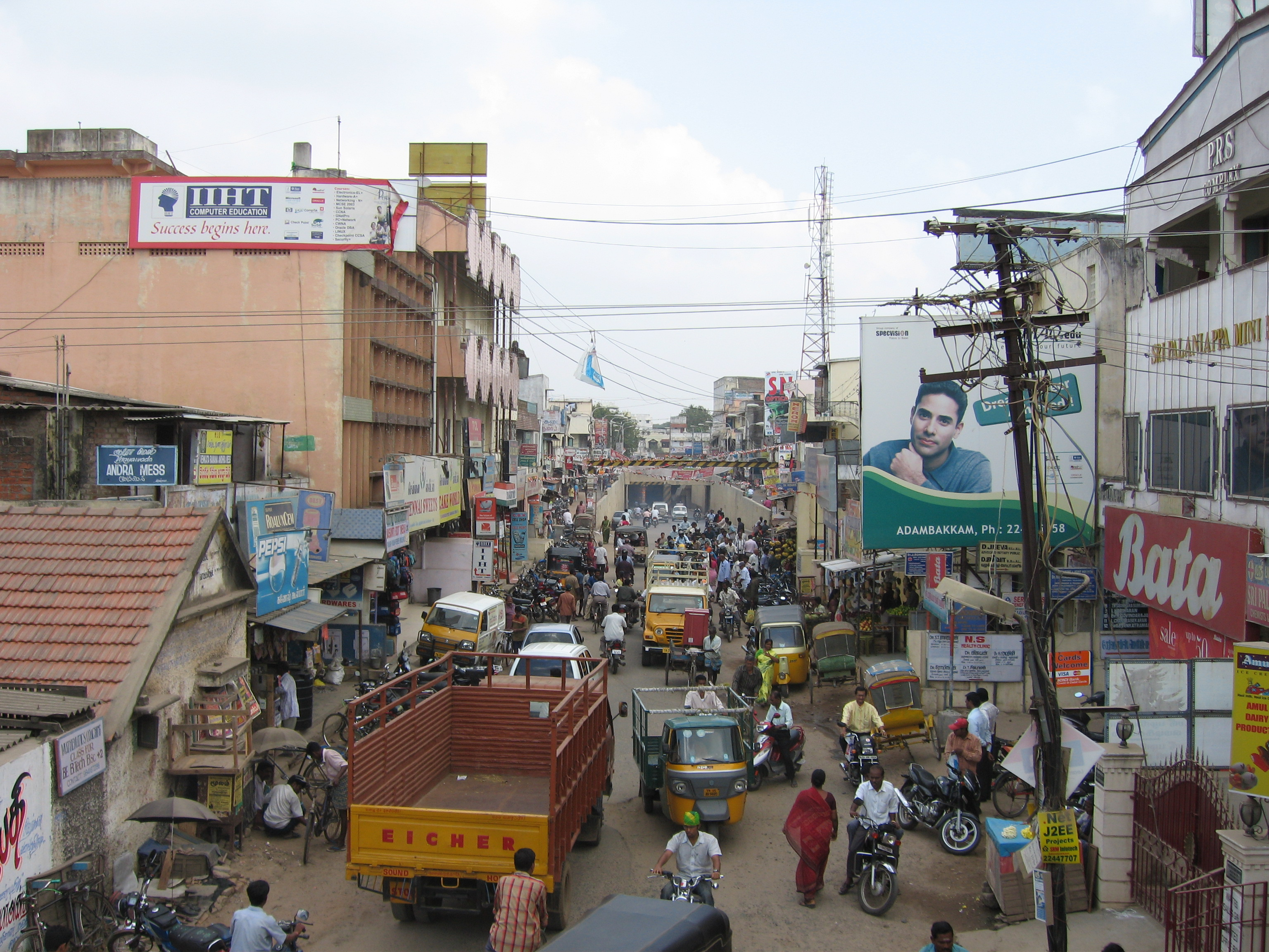 Picture taken at Adambakkam, India.